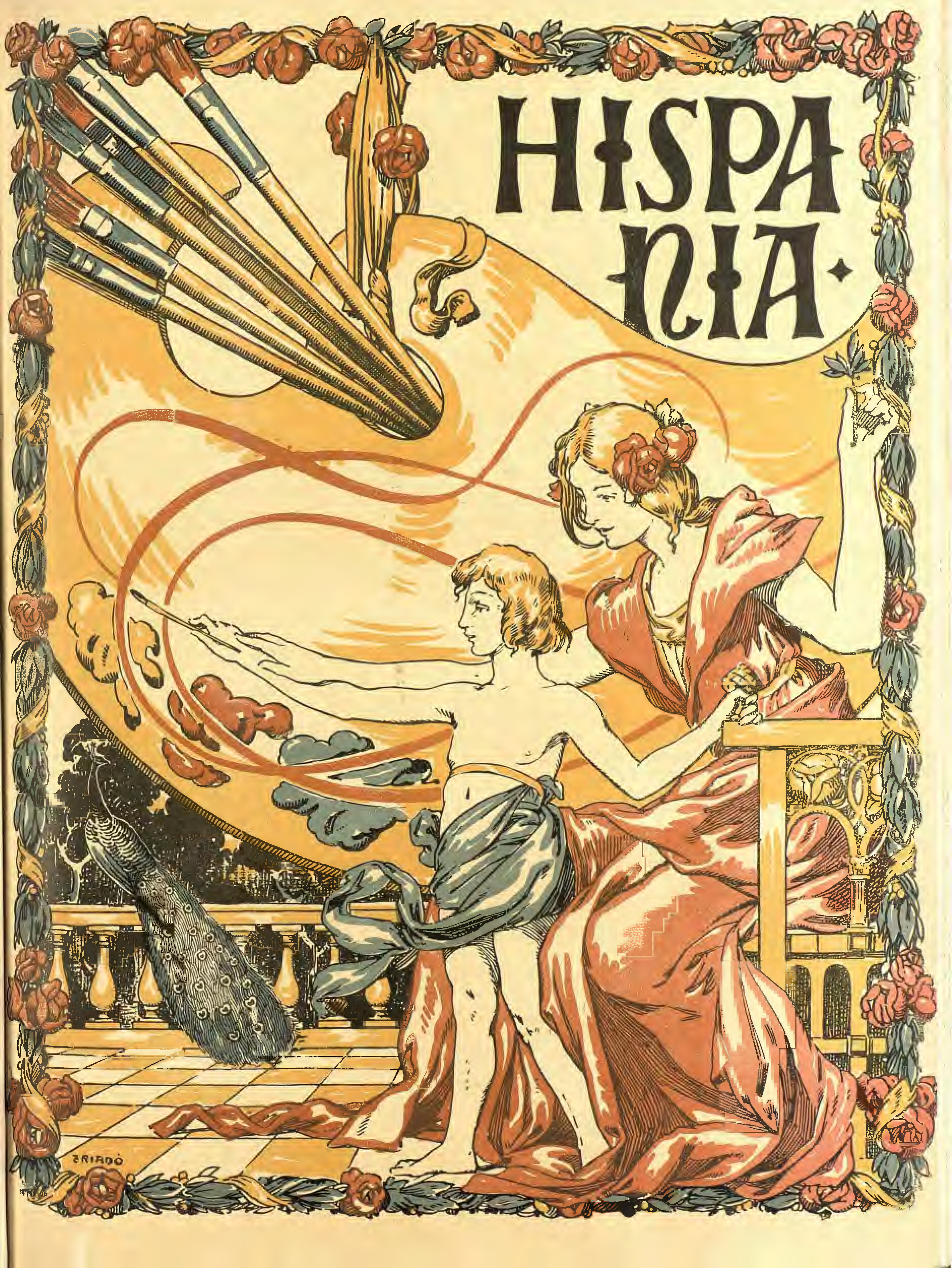 Portada nº57 de la revista modernista Hispania